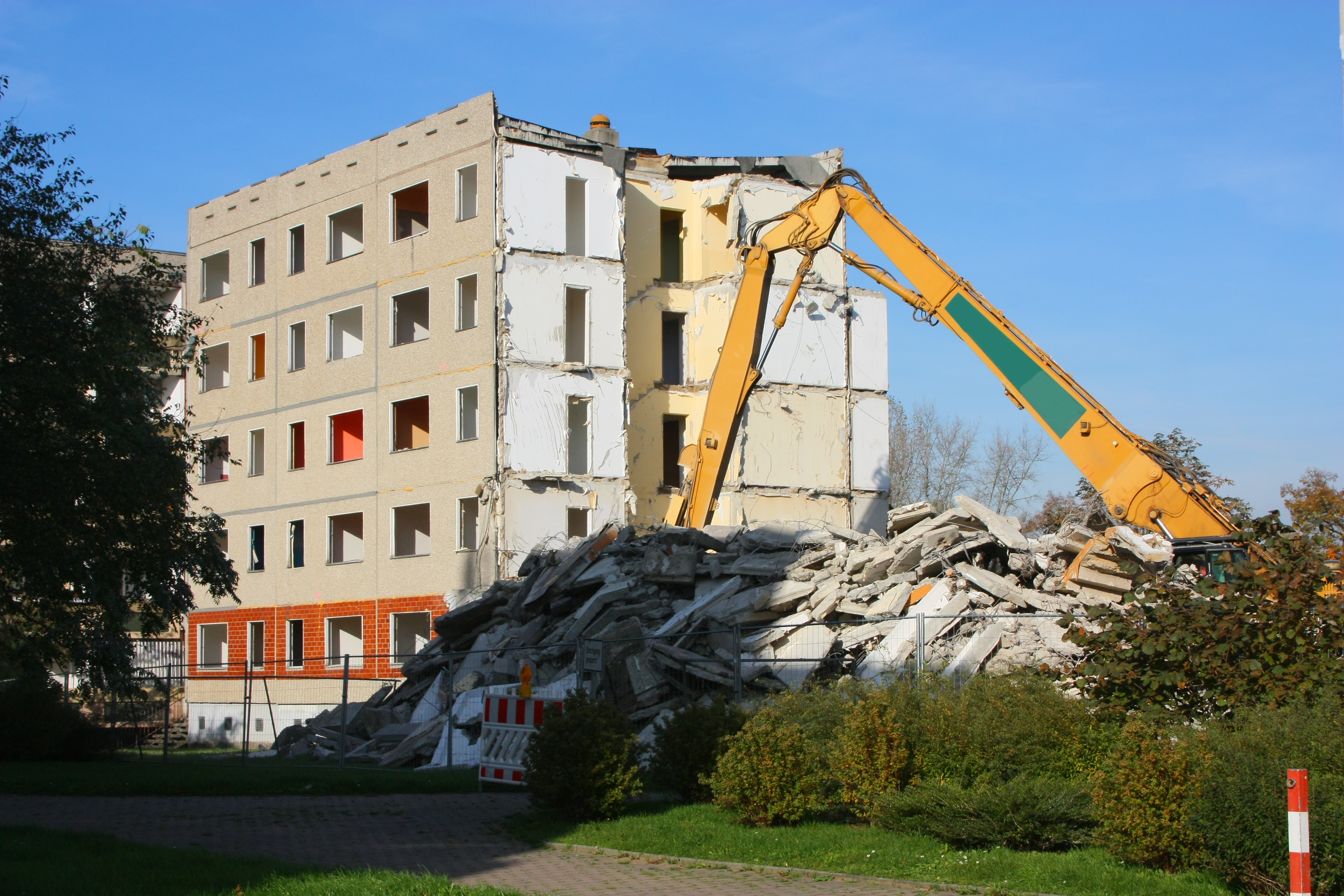 Abriss des südlichen Blockes im Fischerring am 27. 10. 2014